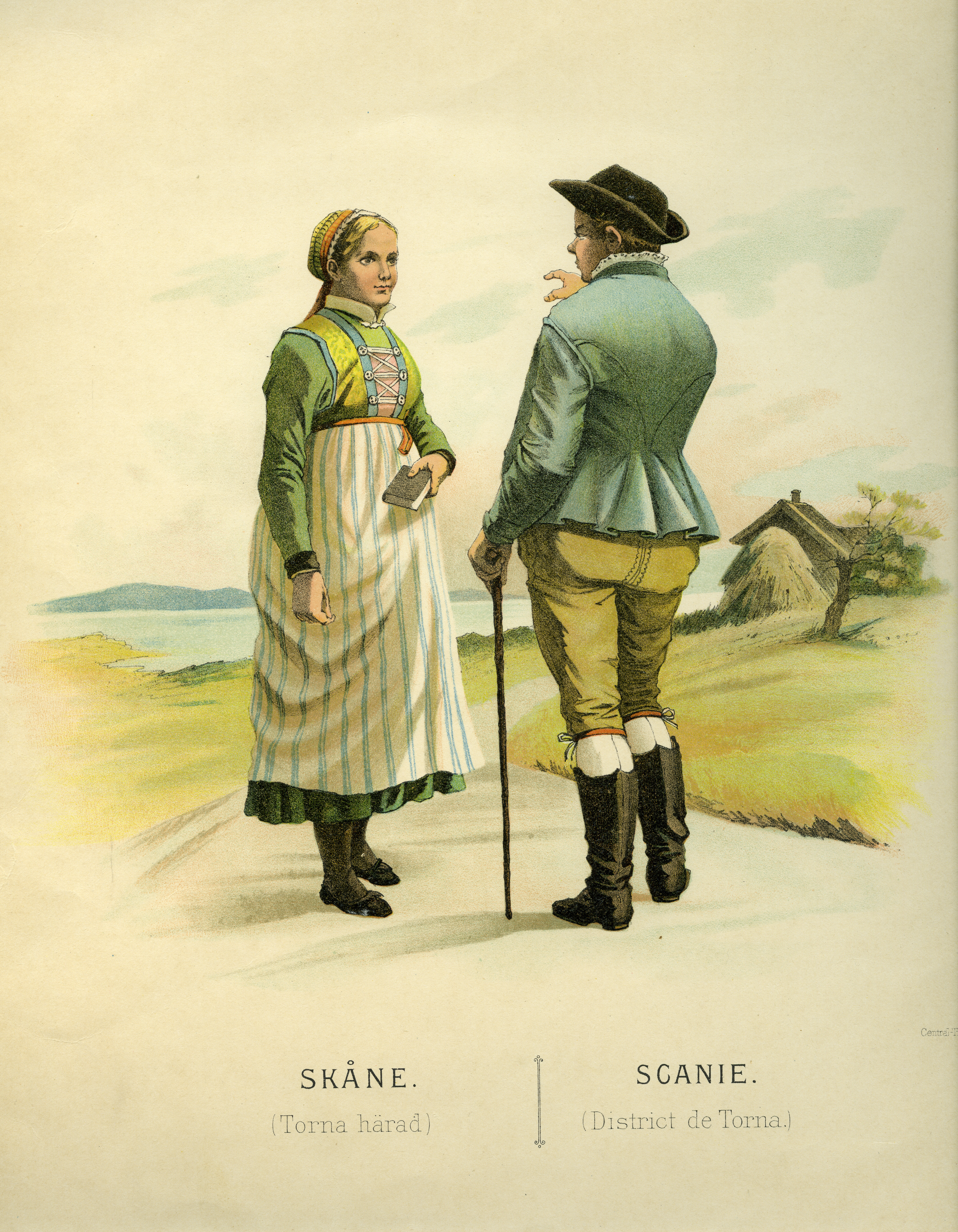 Folkdräkt från Torna härad, Skåne, Sverige.